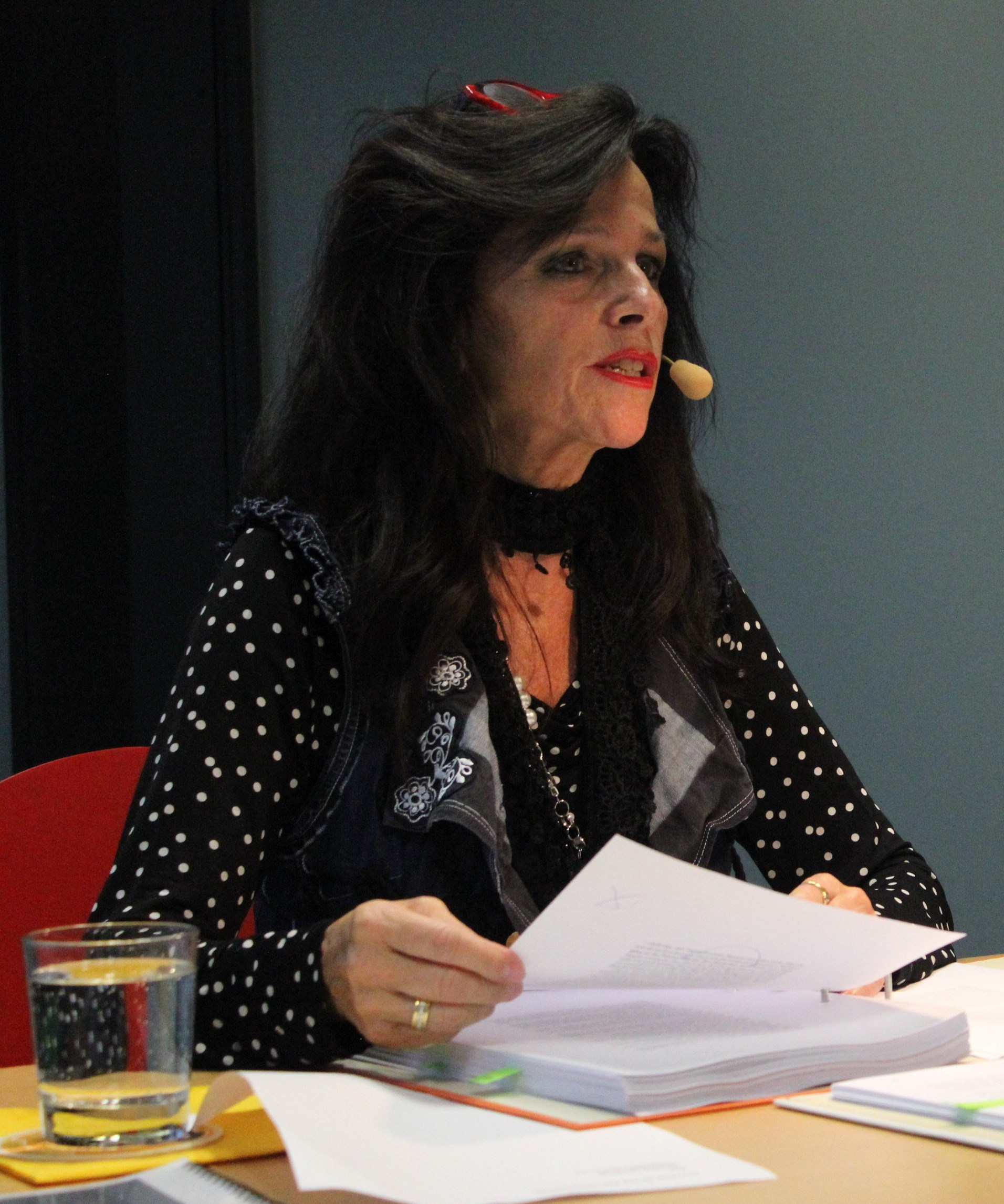 Die Schweizer Kriminalautorin Silvia Götschi bei einer Lesung.